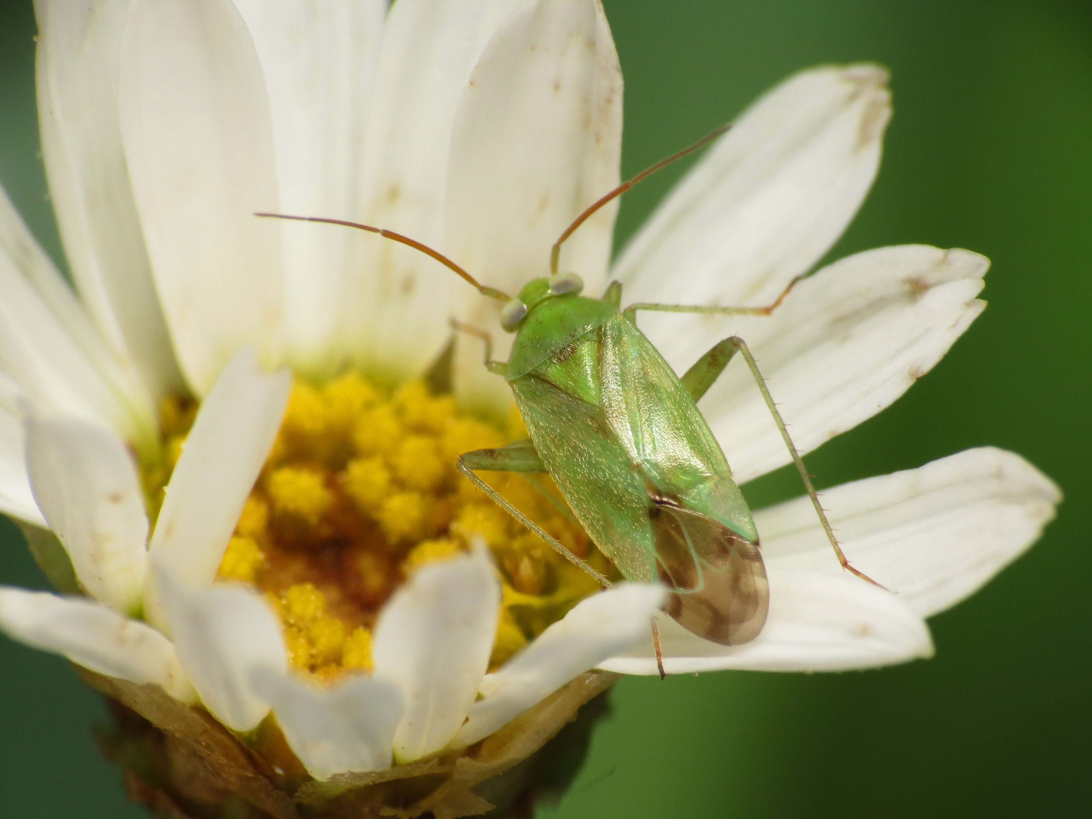 Miridae sp. Els Poblets, Alicante, Spain